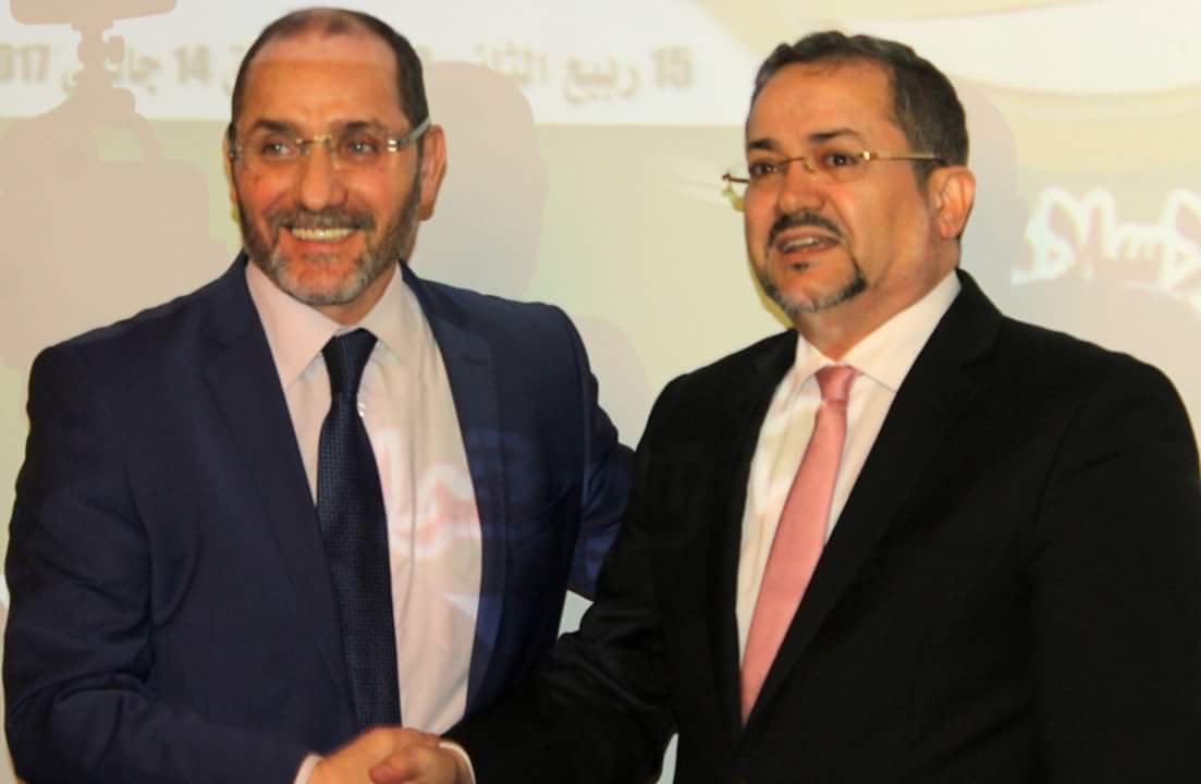 الندوة الصحفية المشتركة لإعلان الوحدة بين حركة مجتمع السلم وجبهة التغيير يظهر في الصورة عبد المجيد مناصرة و عبد الرزاق مقري